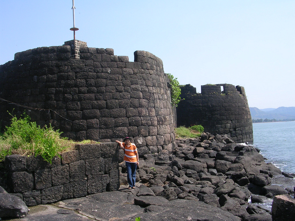 Kolaba fort - 1